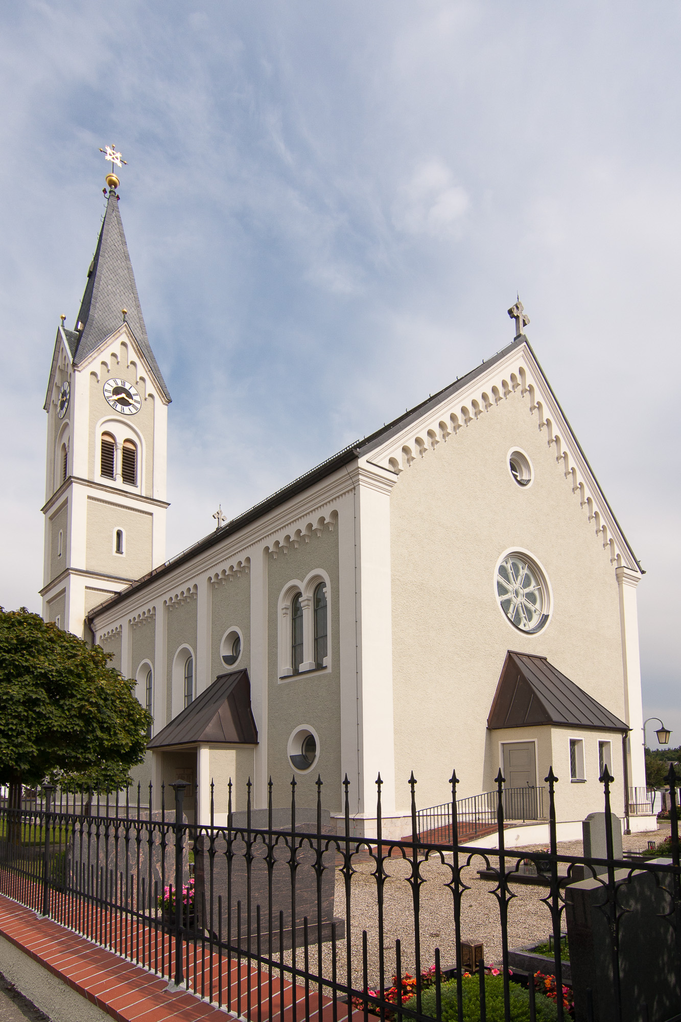 Kirche St. Laurentius; 1887-89; mit Ausstattung.This is a photograph of an architectural monument.